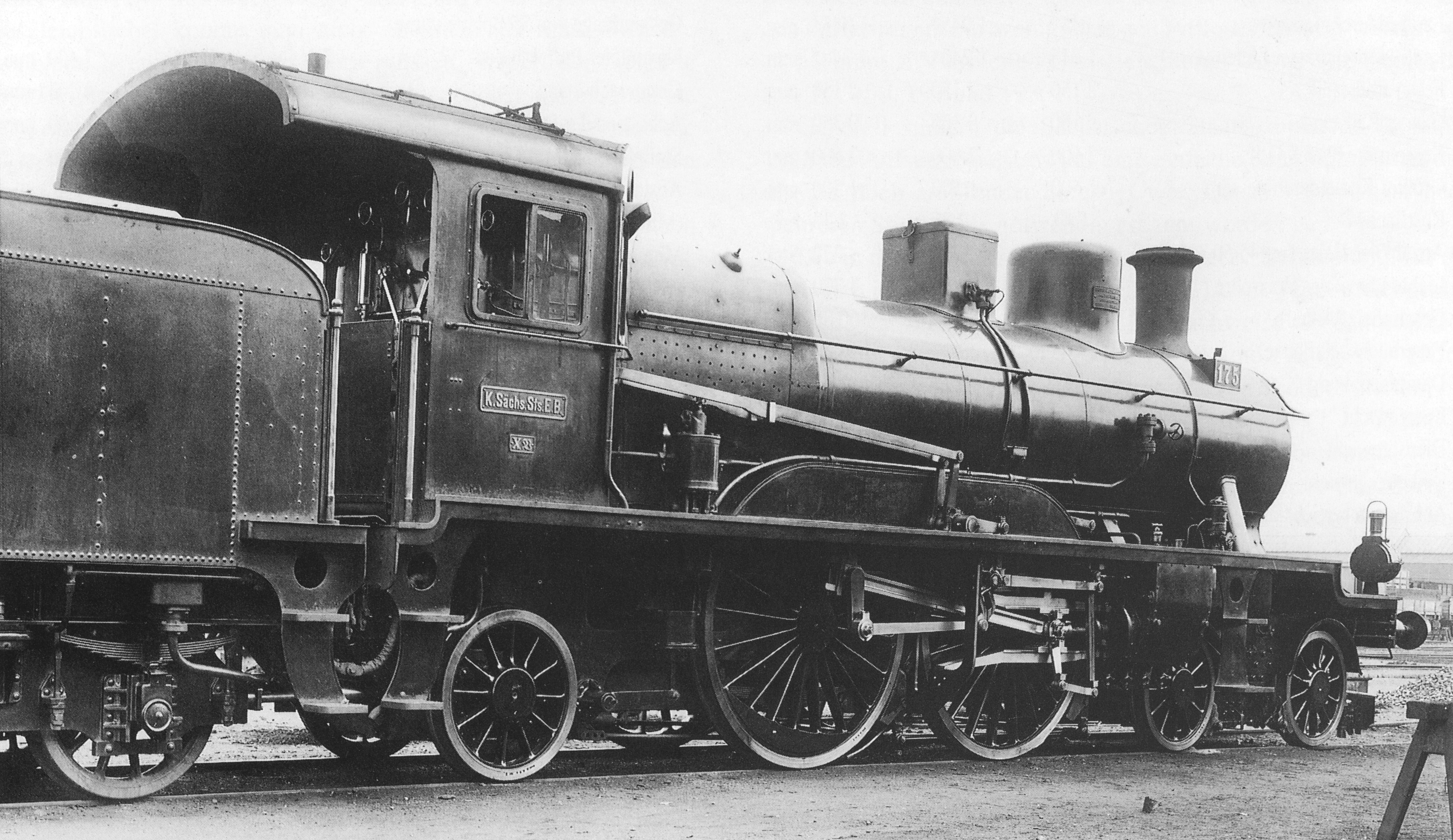 Dampflokomotive Sächsische X V.